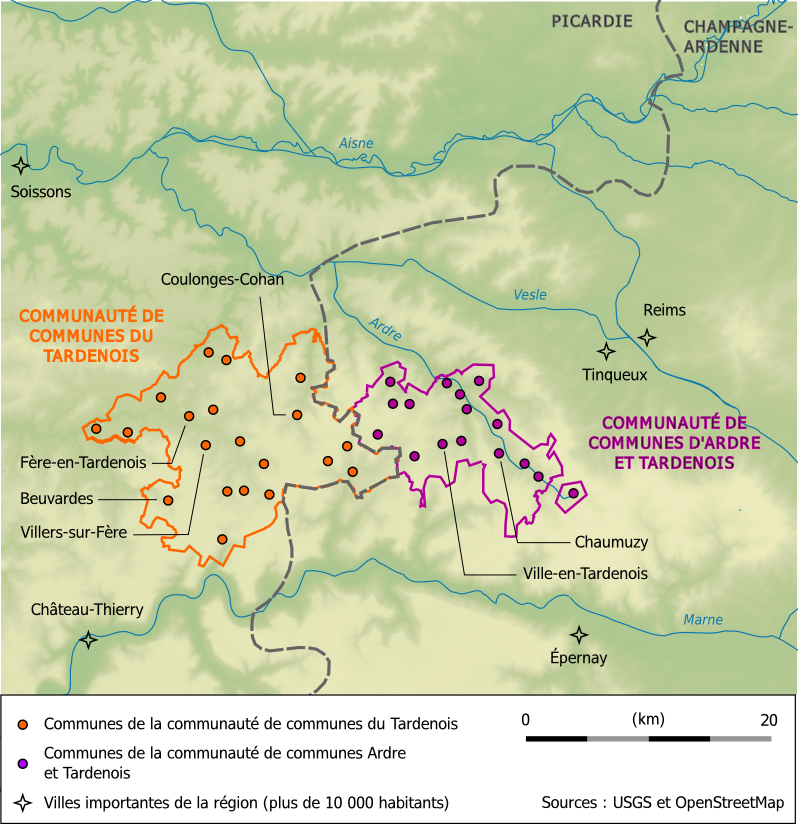 Carte des deux communautés de communes portant le nom de Tardenois : celle du Tardenois dans l'Aisne (02, Picardie) et celle d'Ardre et Tardenois dans la Marne (51, Champagne-Ardenne)